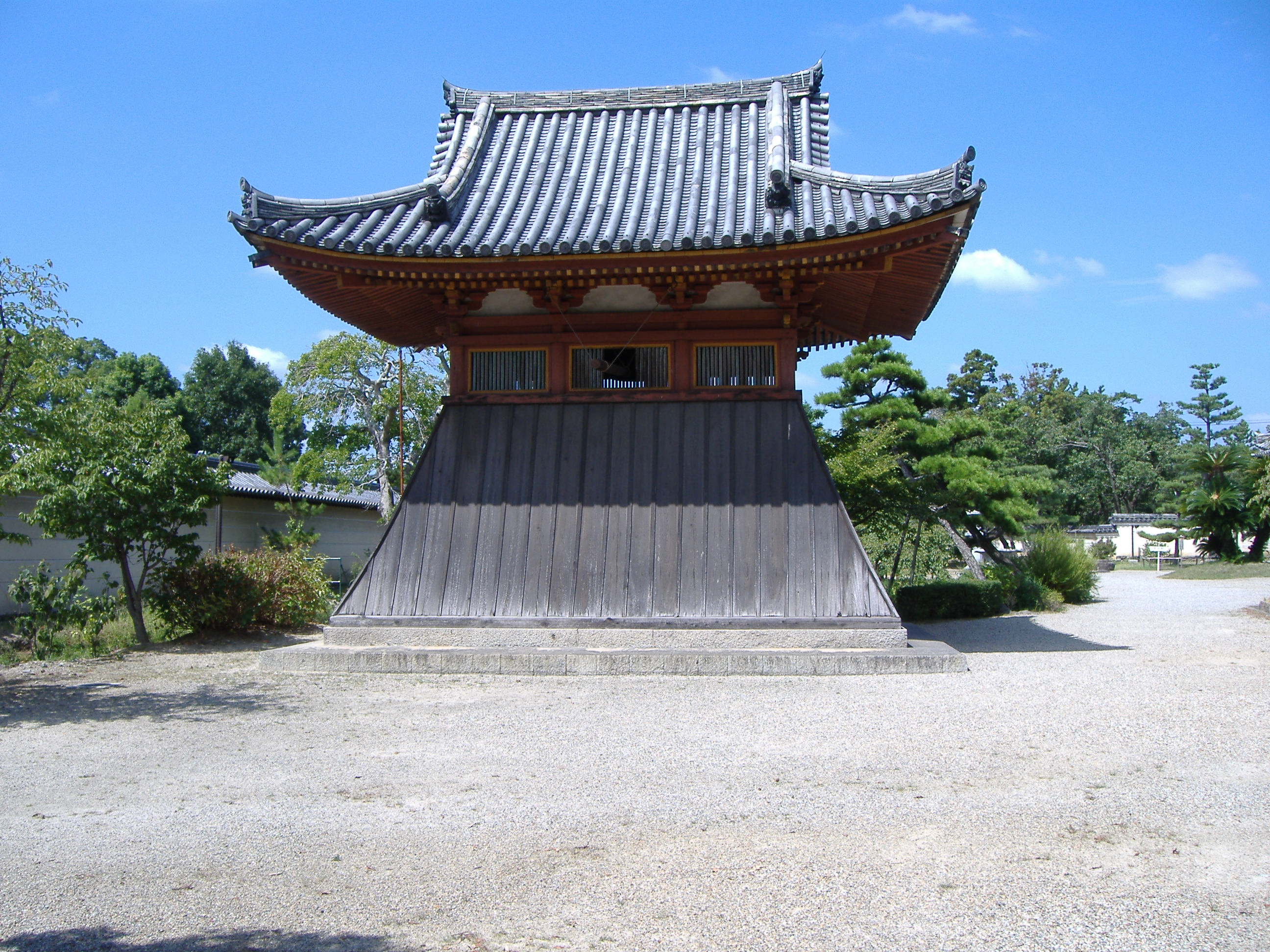 法華寺（奈良市） 鐘楼